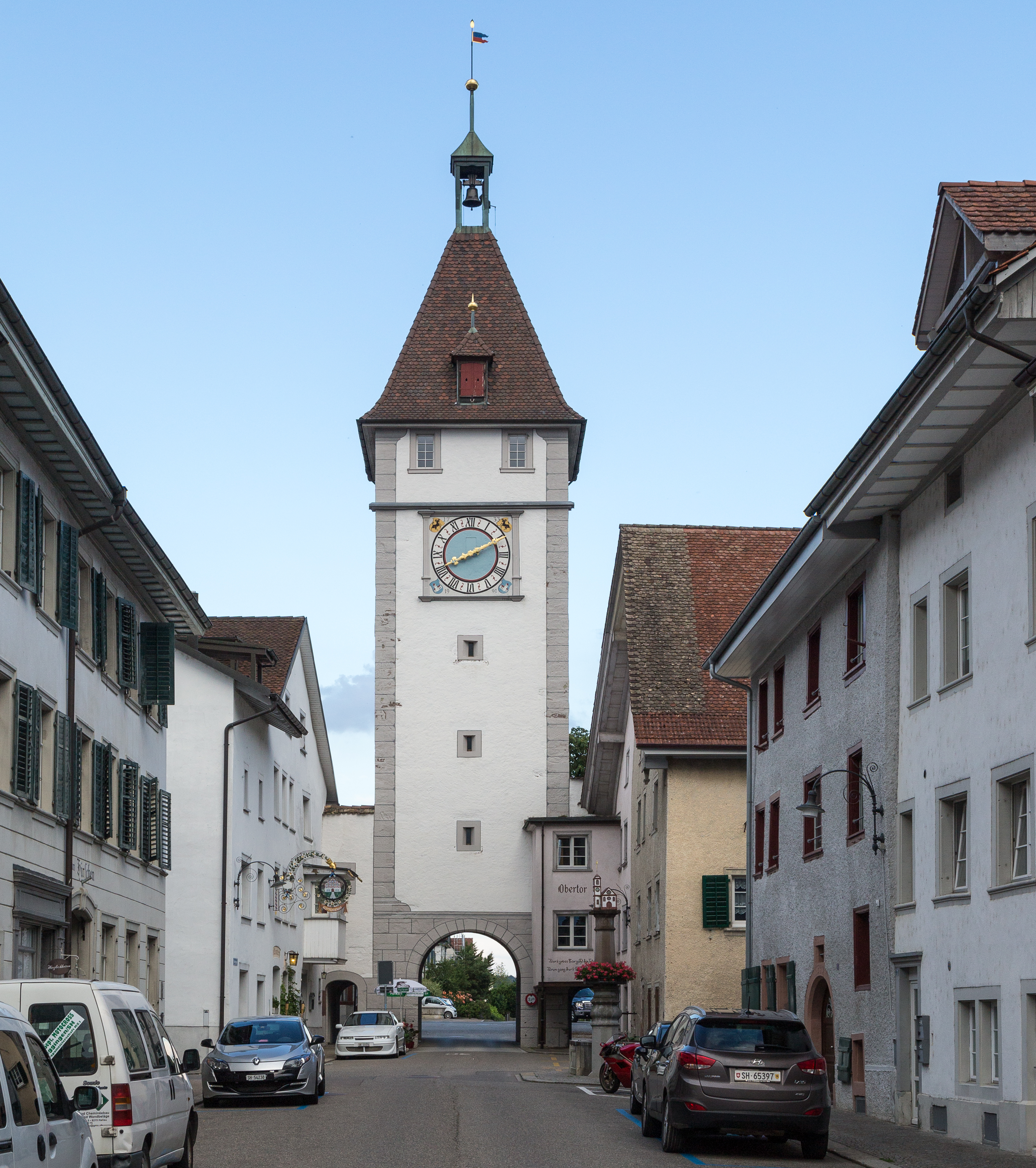 Obertor in Neunkirch SH